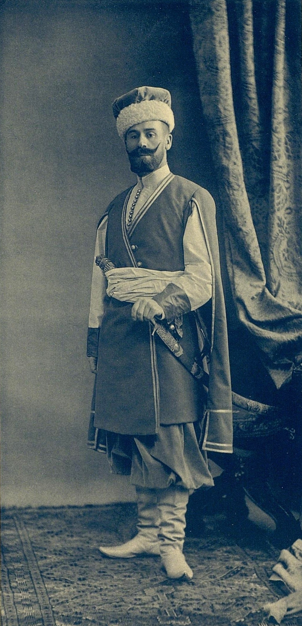 Штабс-ротмистр Лейб-гвардии Конно-гренадерского полка Борис Андреевич Виднэс, в костюме есаула Сумского слободского казачьего полка 1651 года.